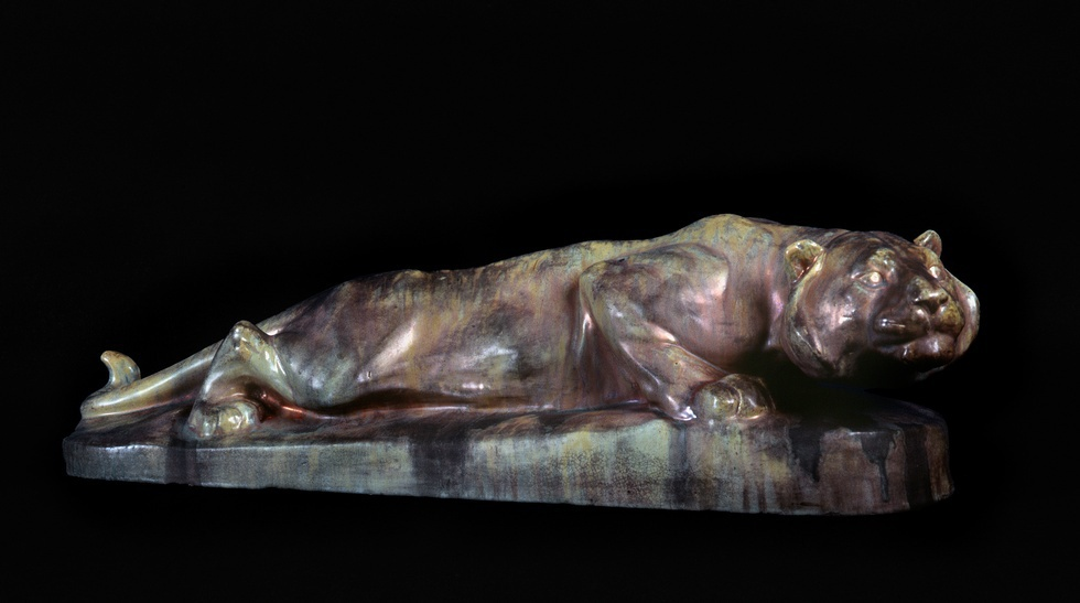 une panthère en céramique du sculpteur Marzolff